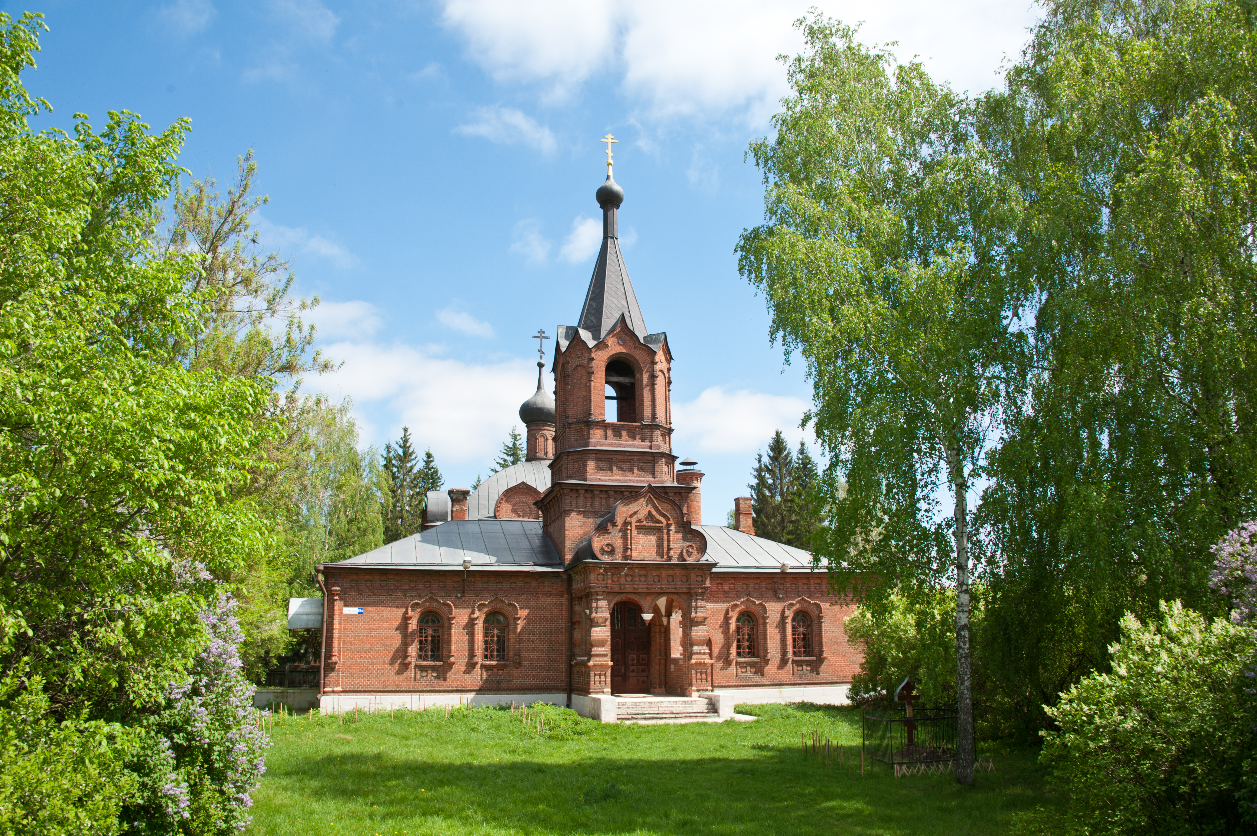 Отдел СИХМ - Покровская старообрядческая церковь